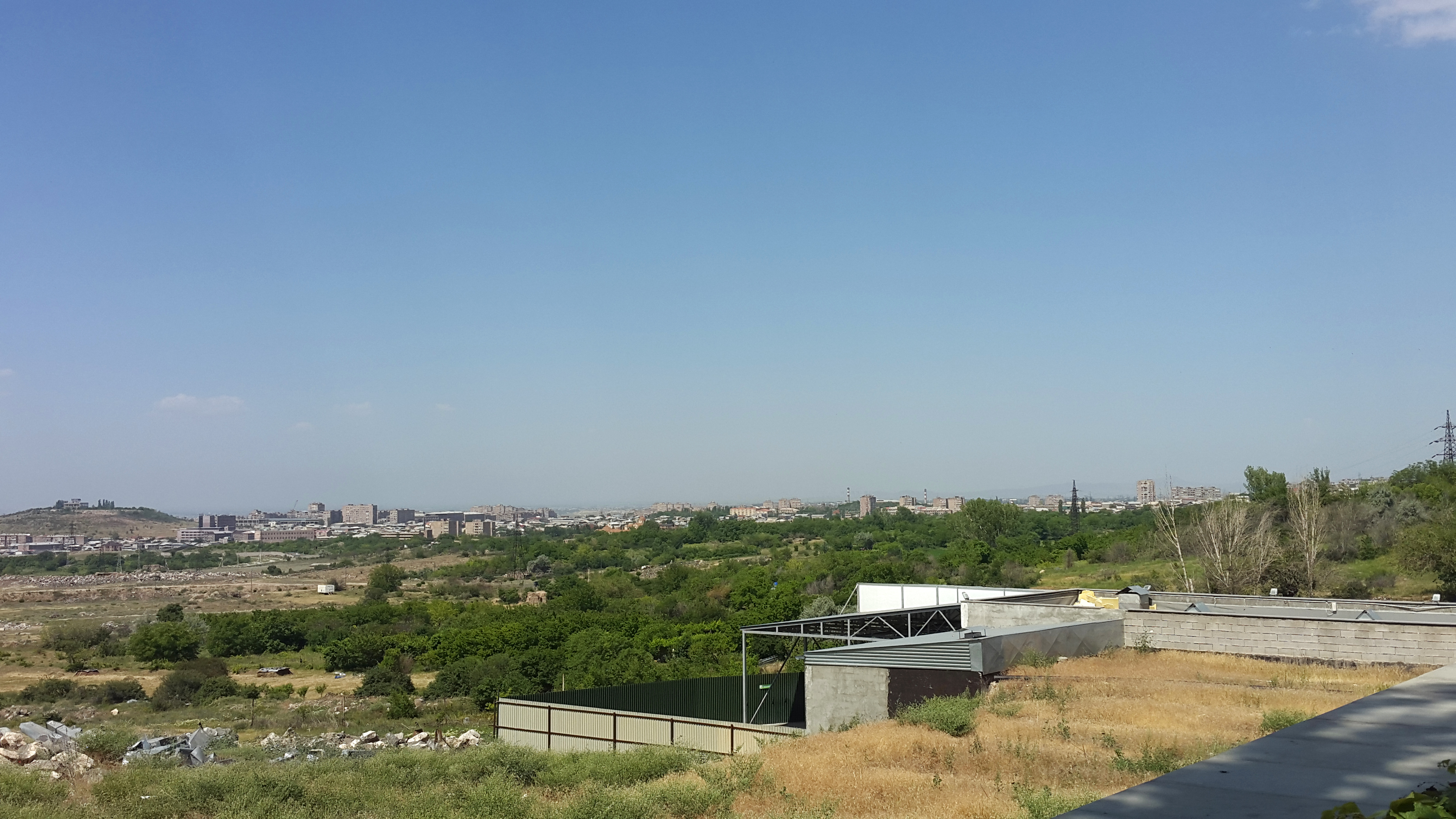 Դալմայի այգիներ